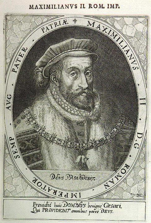 Custos, Dominicus: Atrium heroicum Caesarum, regum, [...] imaginibus [...] illustr[atum]. Pars 1-4. Augsburg: M. Manger, J. Praetorius, 1600-1602. 191 Bl.; 169 (von 171) Porträts. 30 x 19,5 cm